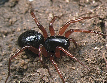 female Mallinella fulvipes from Okinawa.